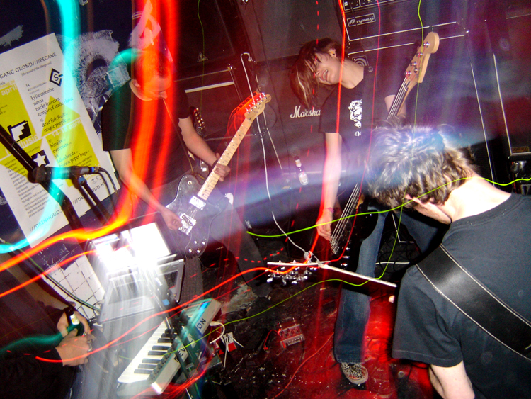 Overmars